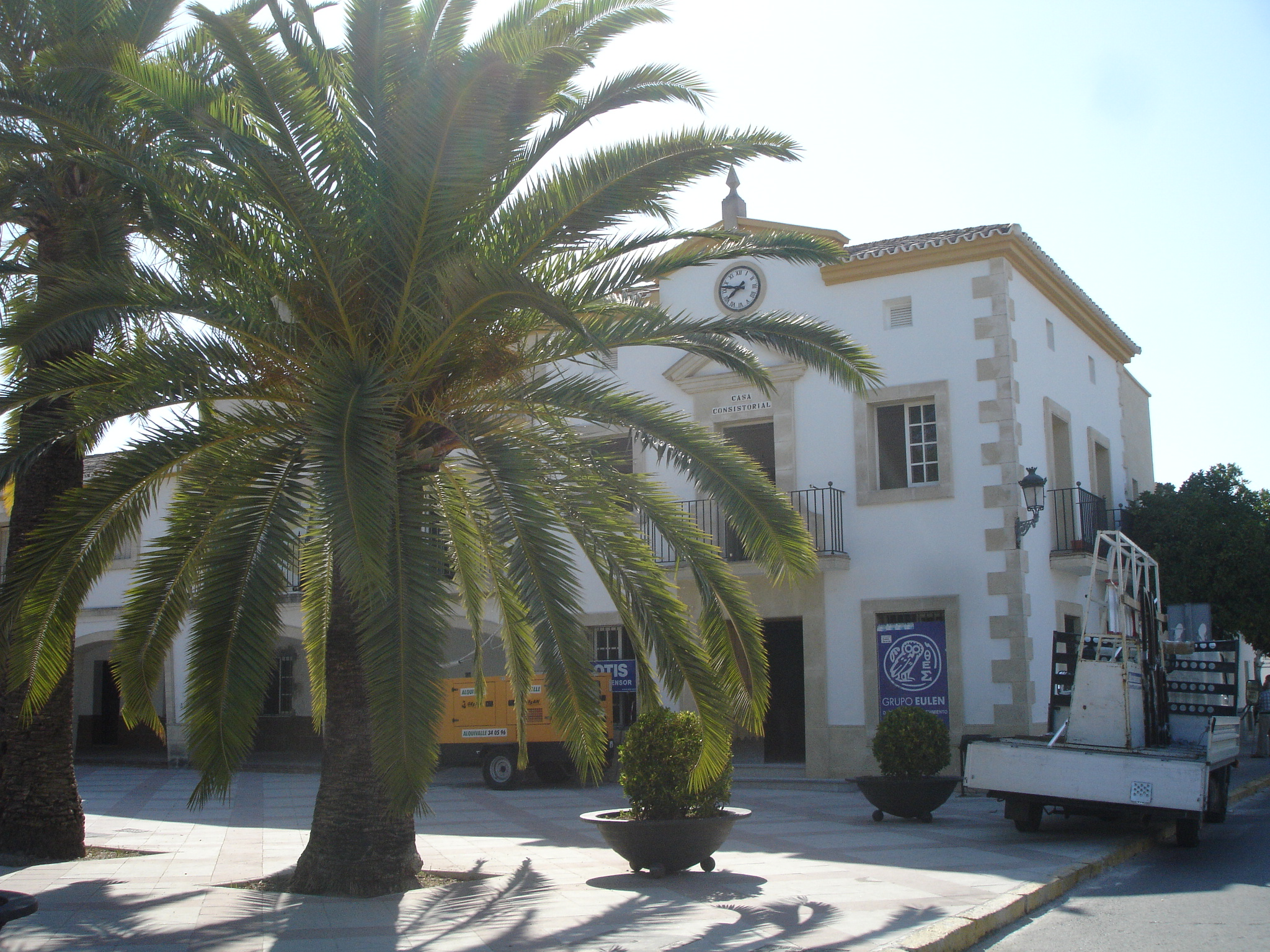 Guadalacacín Guadalcacin town hall, Jerez de la Frontera, Andalusia (Spain)